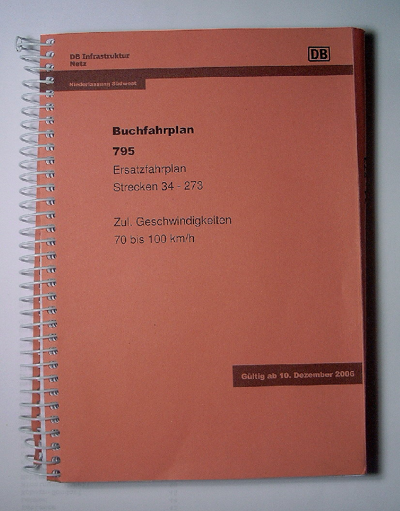 Ersatzfahrplan Heft